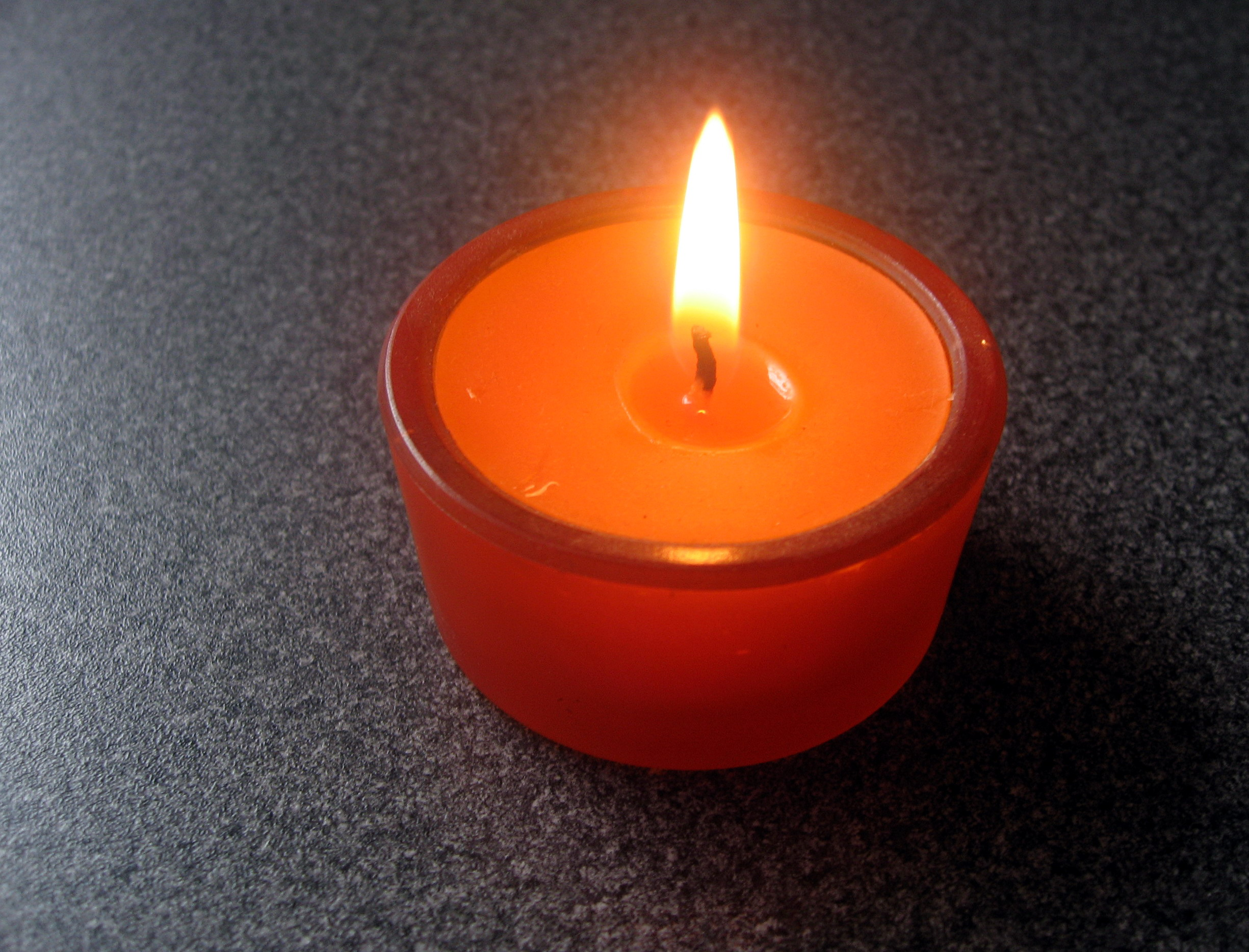 Hořící svíčka